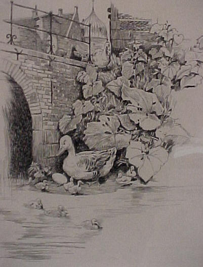 Illustration zu Hans Christian Andersens Märchen "Das häßliche Entlein"